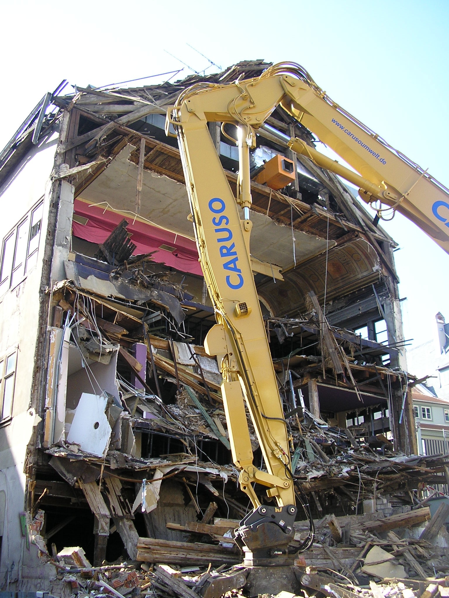 Erfurt Anger 57 Saalabbruch 2006